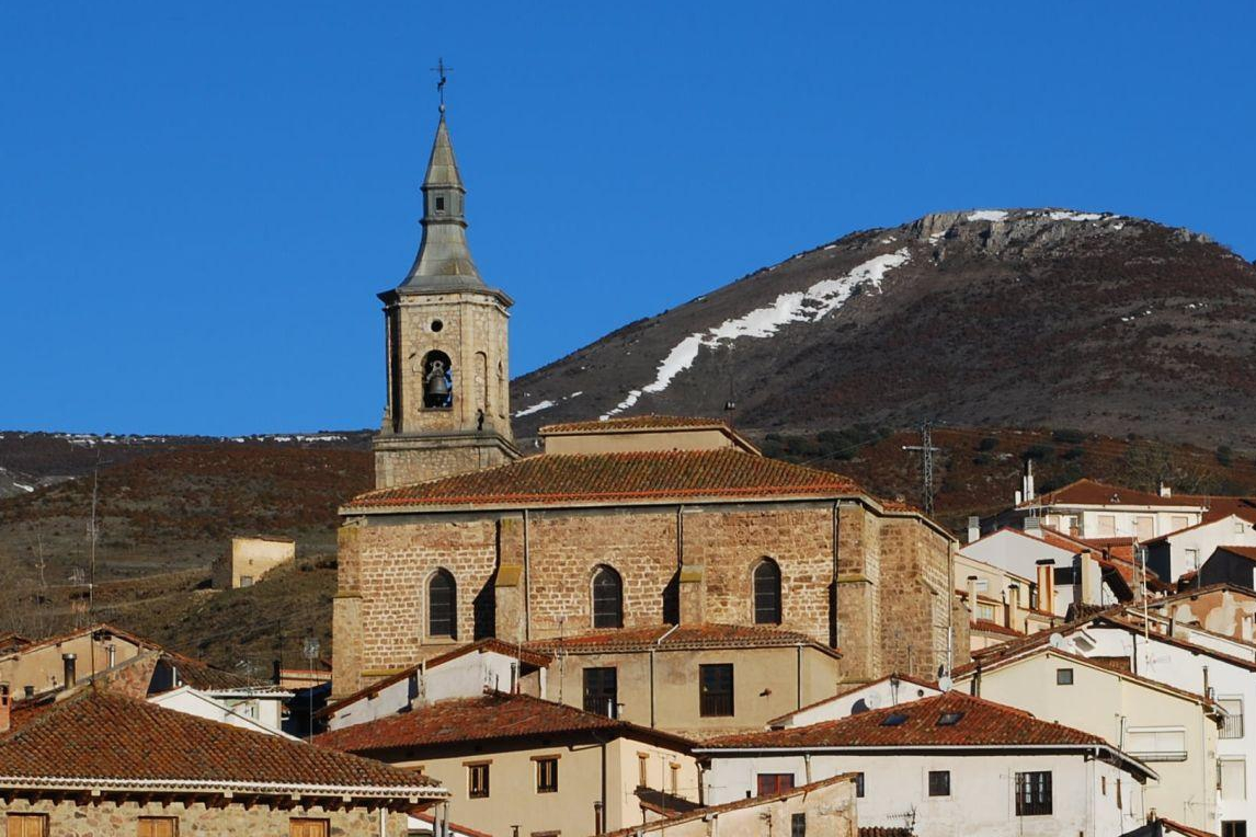 Iglesia de San Martín en Torrecilla en Cameros, La Rioja - España.